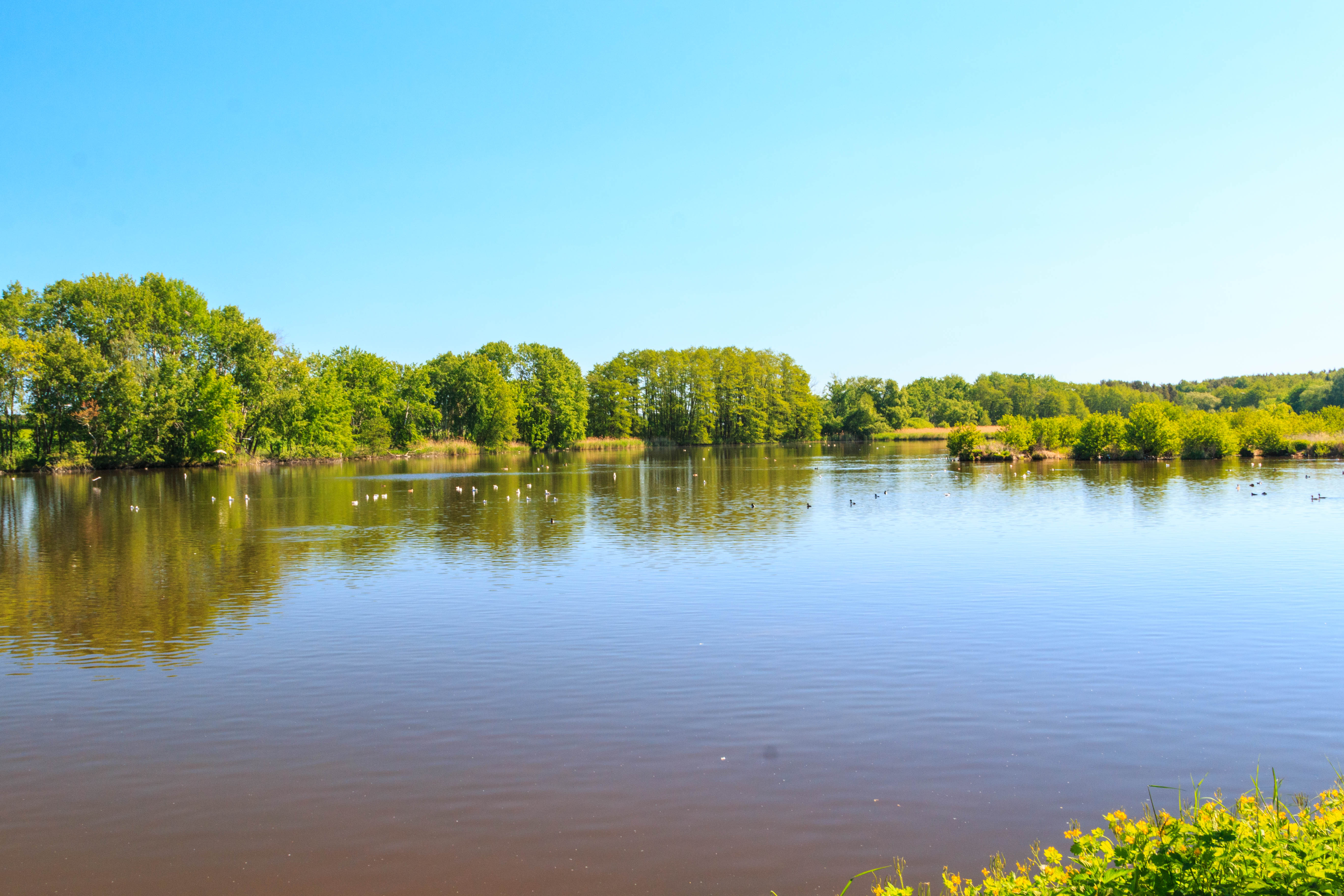 Pohled na Bohumilečský rybník Project: Vodstvo